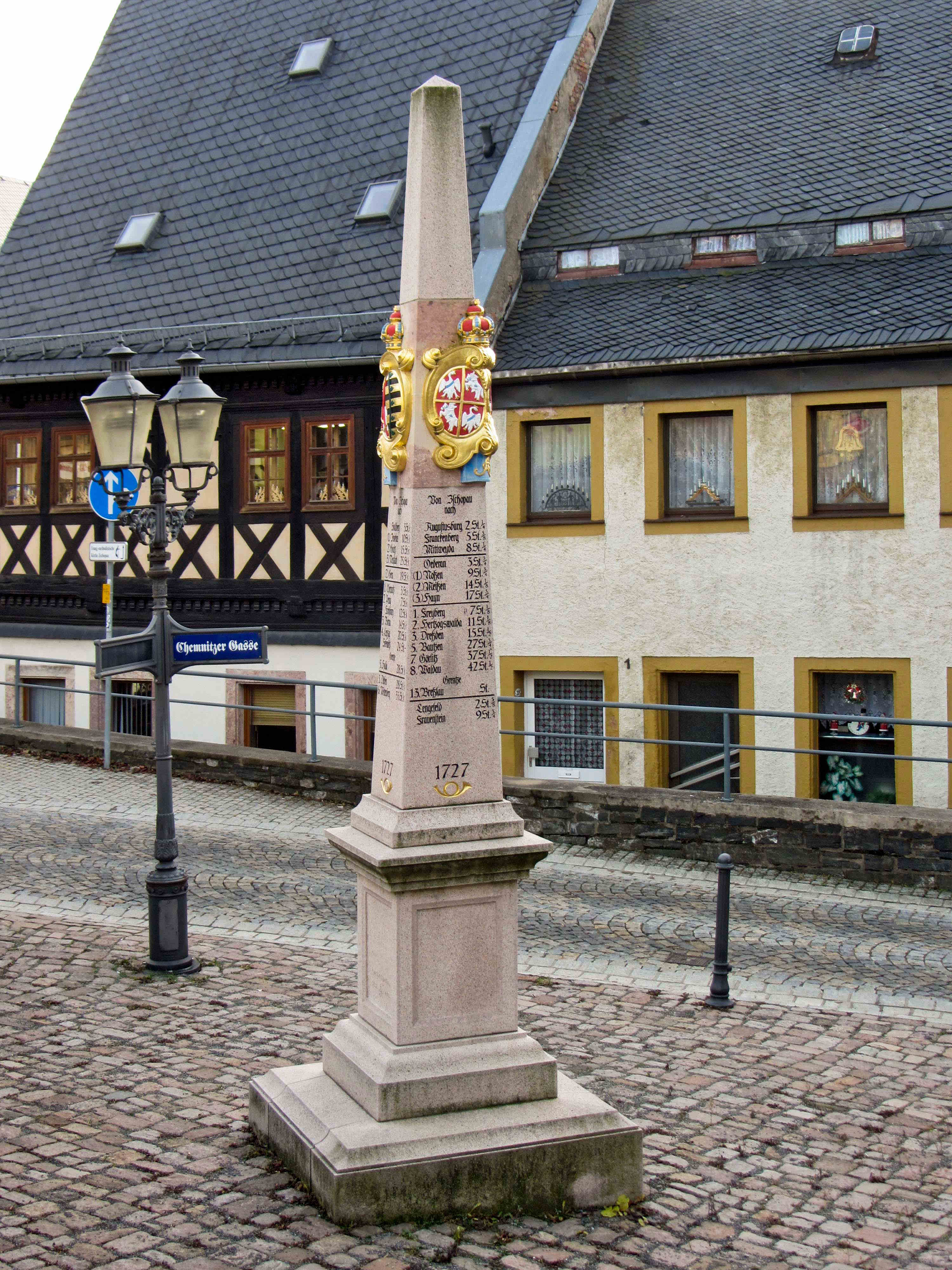 Kursächsische Postmeilensäule-Distanzsäule in Zschopau